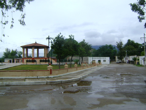 Plaza principal de Soyopa